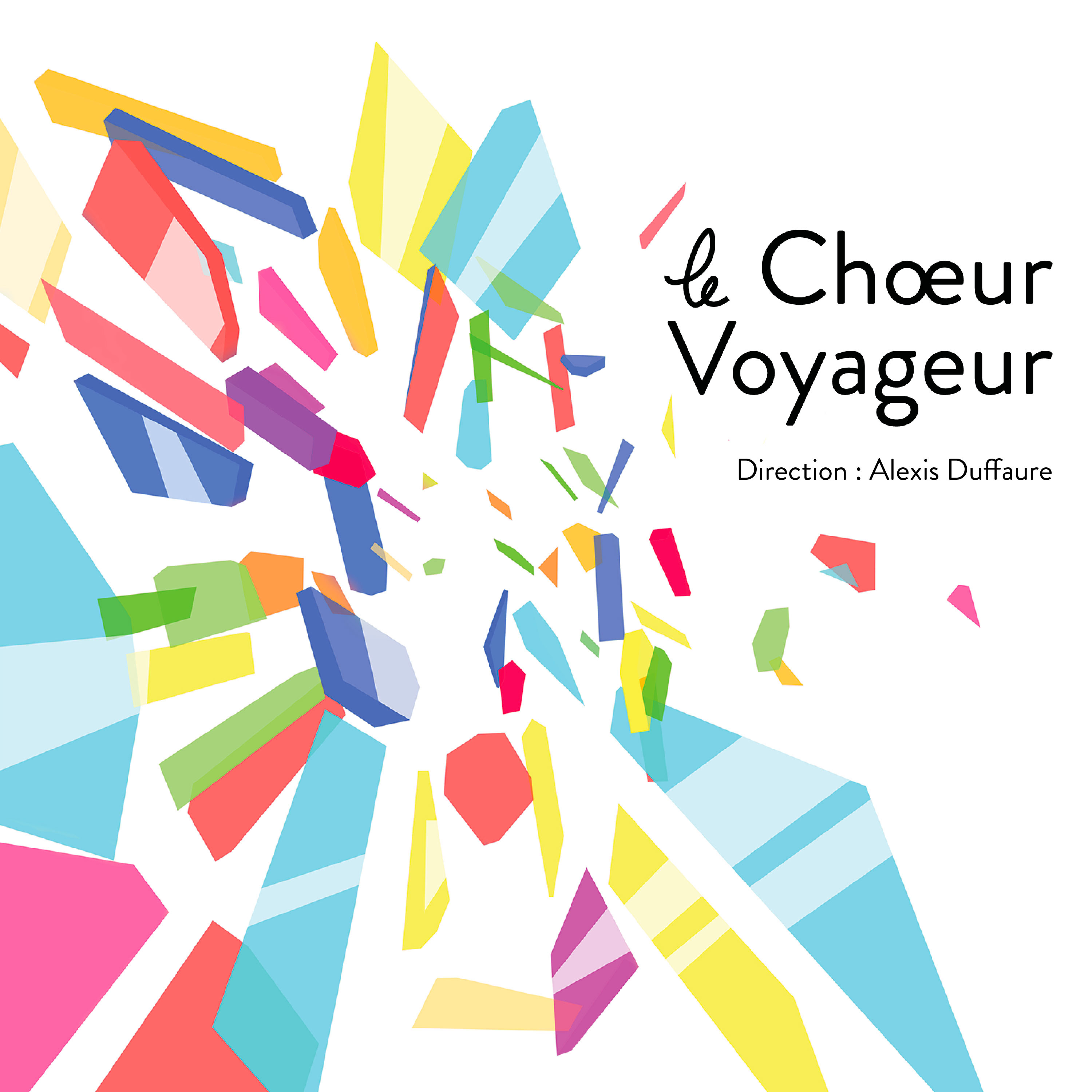 Pochette de l'album éponyme du Chœur Voyageur sorti en fin d'année 2017.